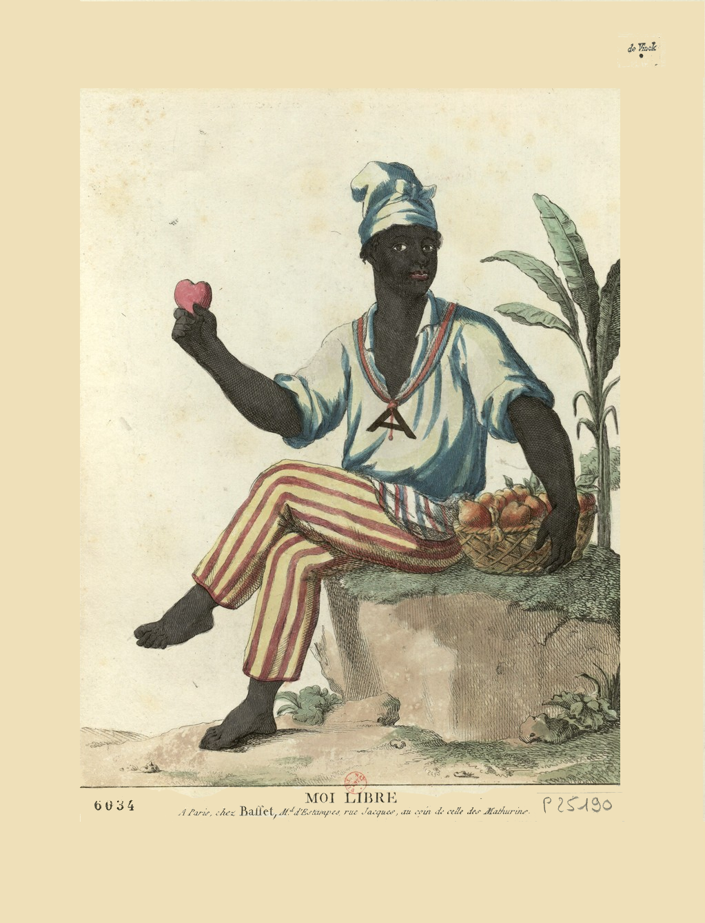 Moi libre, Figures allégoriques, Abolition de l'esclavage aux colonies, chez Basset (A Paris), 1794.